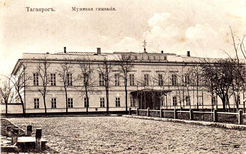 Таганрог, здание классической мужской гимназии с домовой церковью Рождества Пресвятой Богородицы.